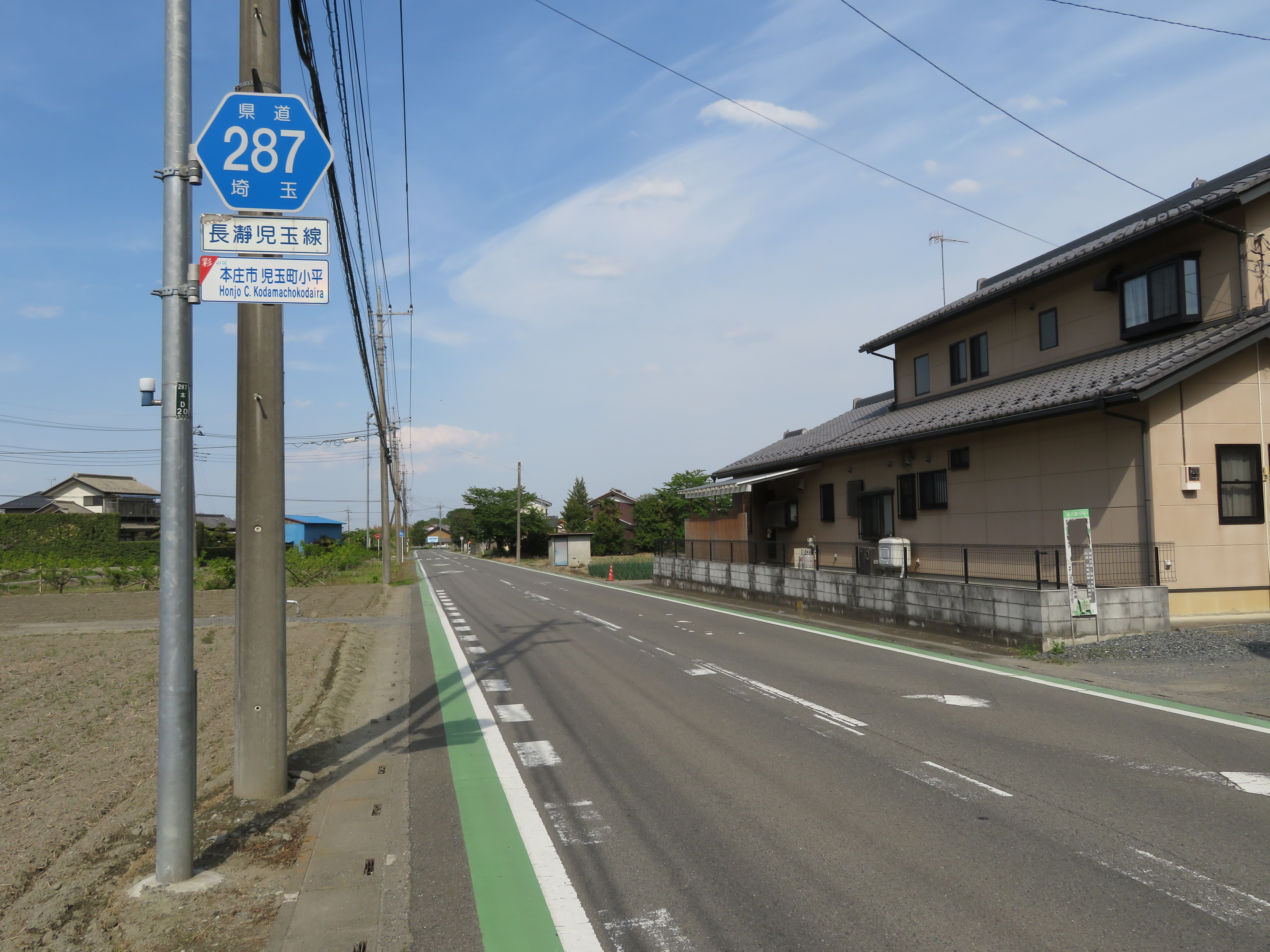 埼玉県道２８７号線本庄市児玉町小平付近（児玉方面を撮影） Canon PowerShot SX720 HS